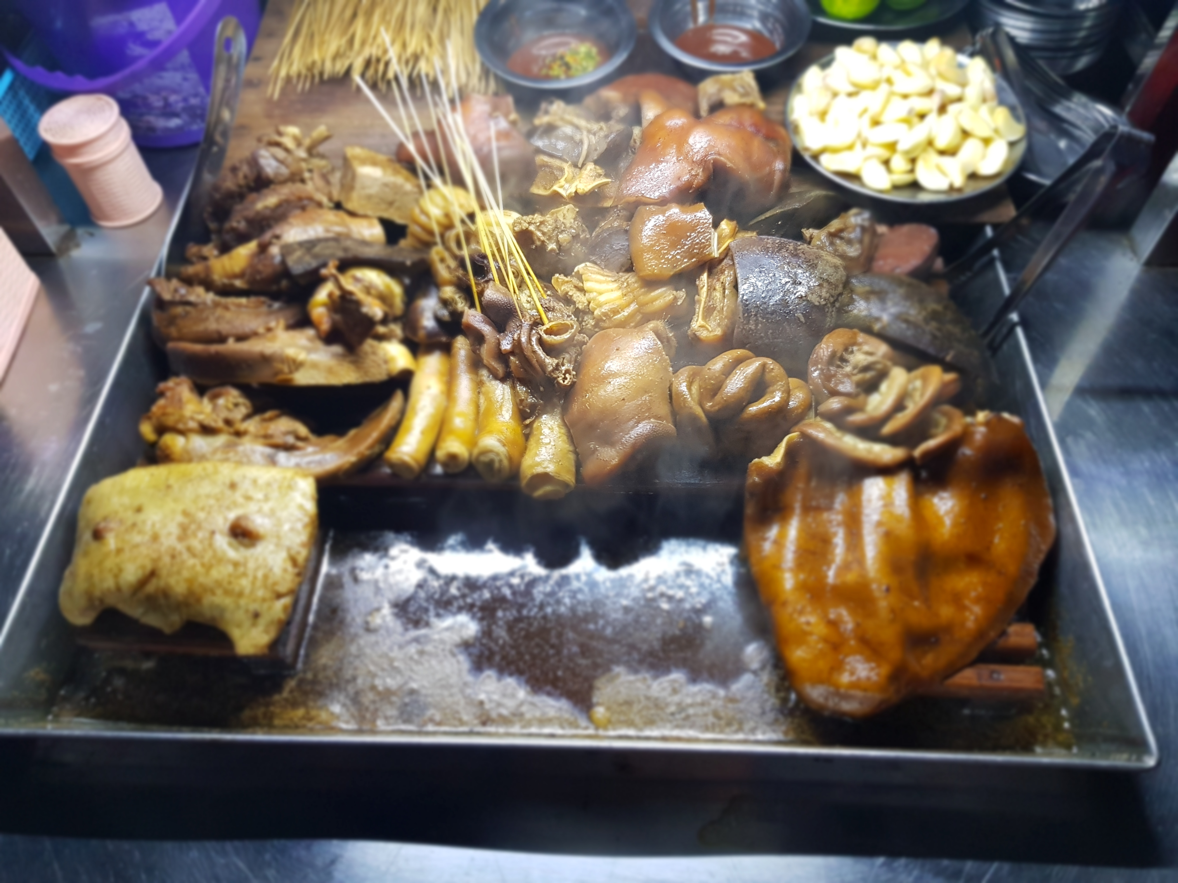 မြန်မာဘာသာ: ရန်ကုန်မြို့၏ လမ်းဘေးစာ တစ်မျိုးဖြစ်သော ဝက်သားတုတ်ထိုး